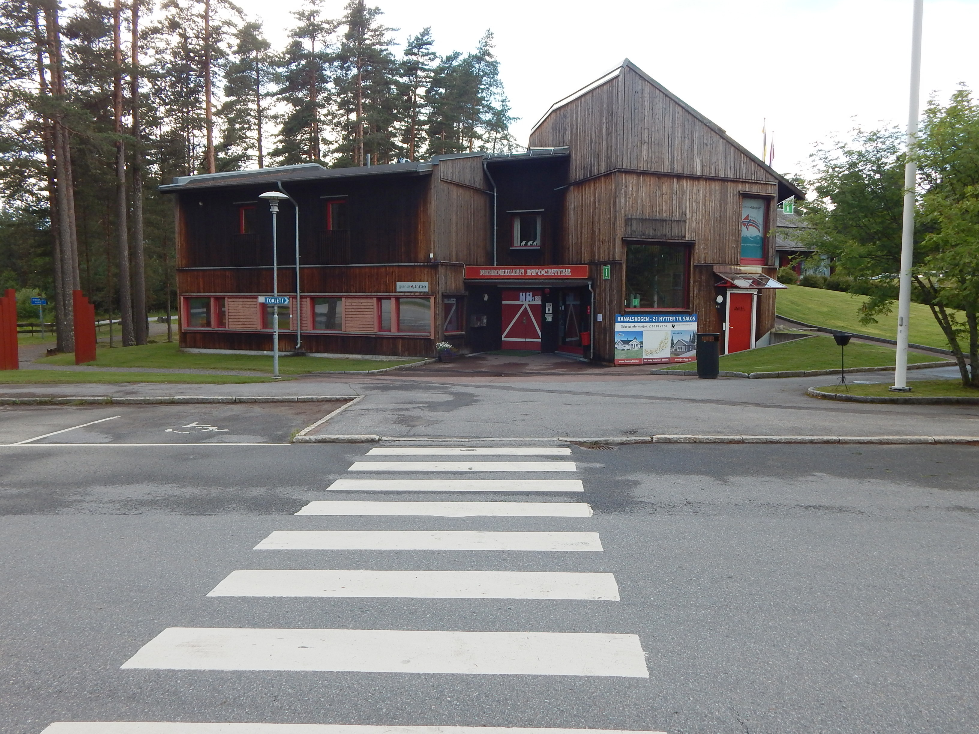 Infosenteret ved Morokulien